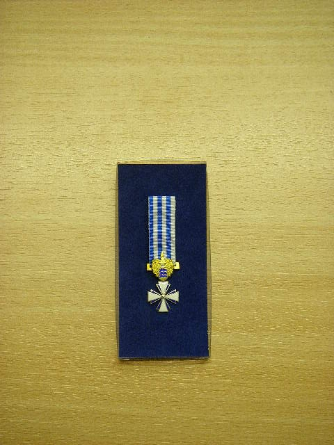 Tallinna vapimärgi miniatuurmärk